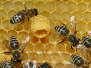 Noch leeres Weiselnäpfchen am Rande einer Bienenwabe. Legt die Königin dort ein Ei hinein, wird die schlüpfende Larve so gefüttert, dass eine Königin heranwächst.